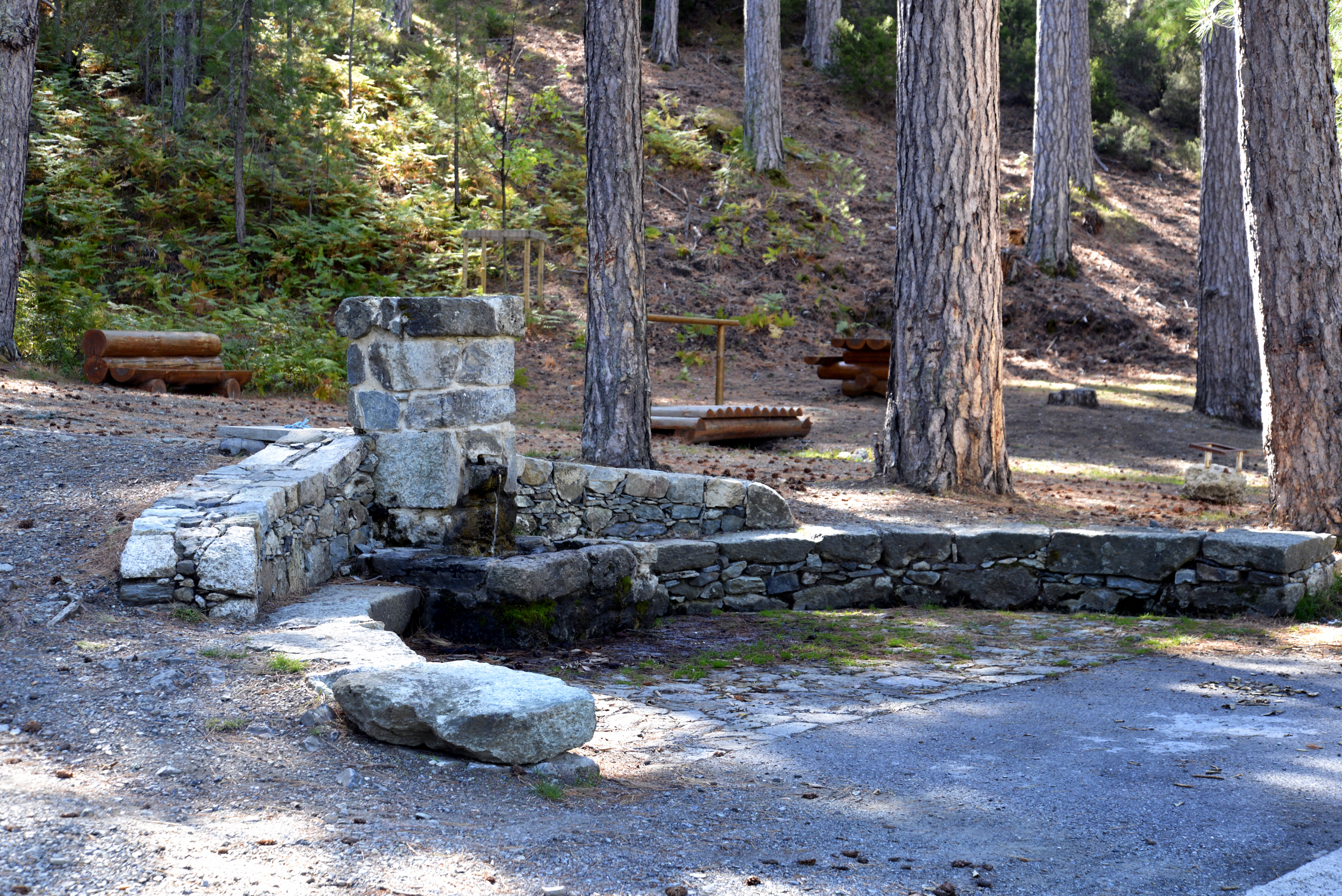 Rospigliani, Centre Corse (Haute-Corse) - Fontaine de Padula, dans la forêt du même nom (ou forêt de Noceta), en bordure de la route D343, avec partie des aménagements pour les pique-niques.